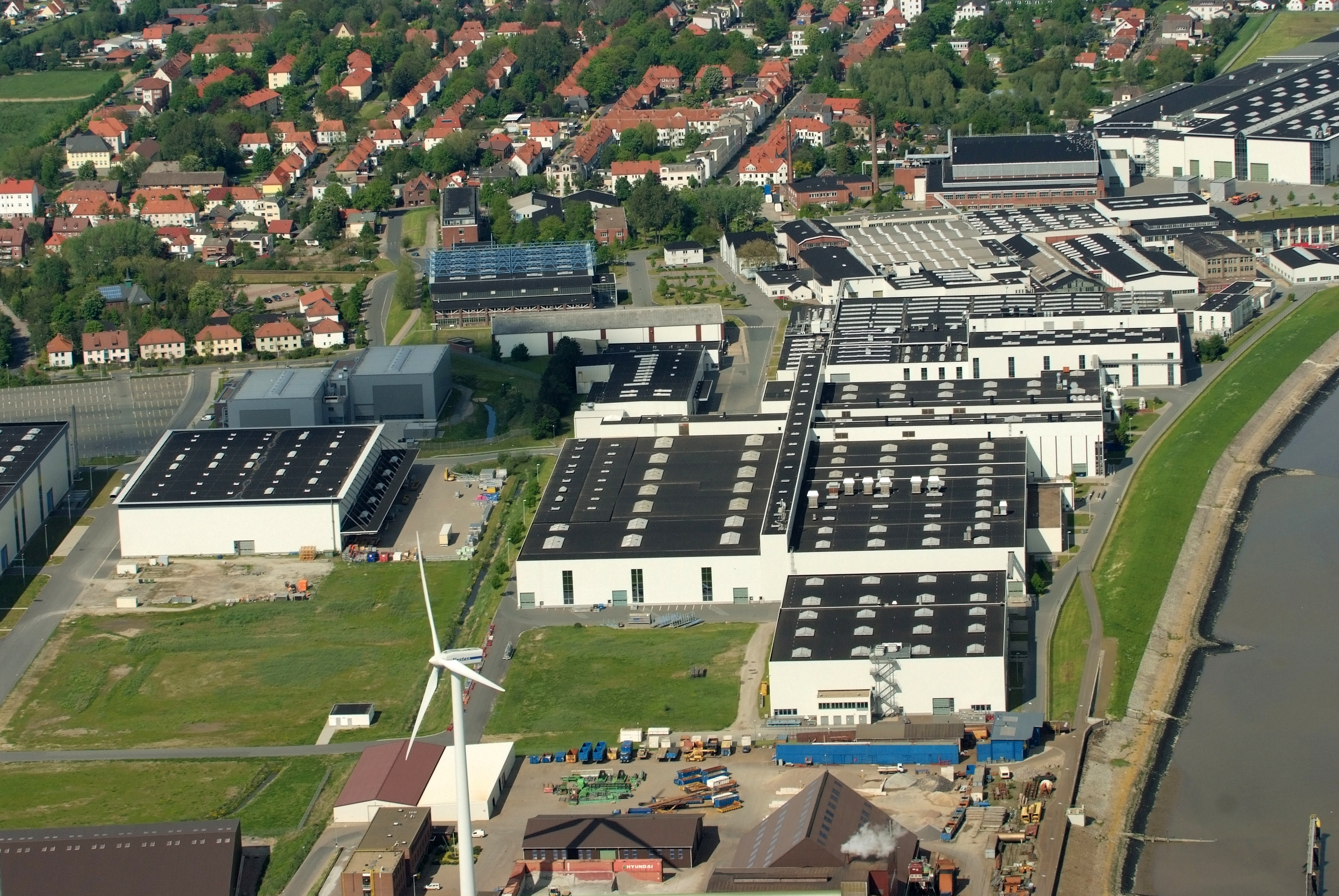 Werksgelände des Flugzeugherstellers Premium Aerotec in Nordenham Fotoflug vom Flugplatz Nordholz-Spieka über Bremerhaven, Wilhelmshaven und die Ostfriesischen Inseln bis Borkum